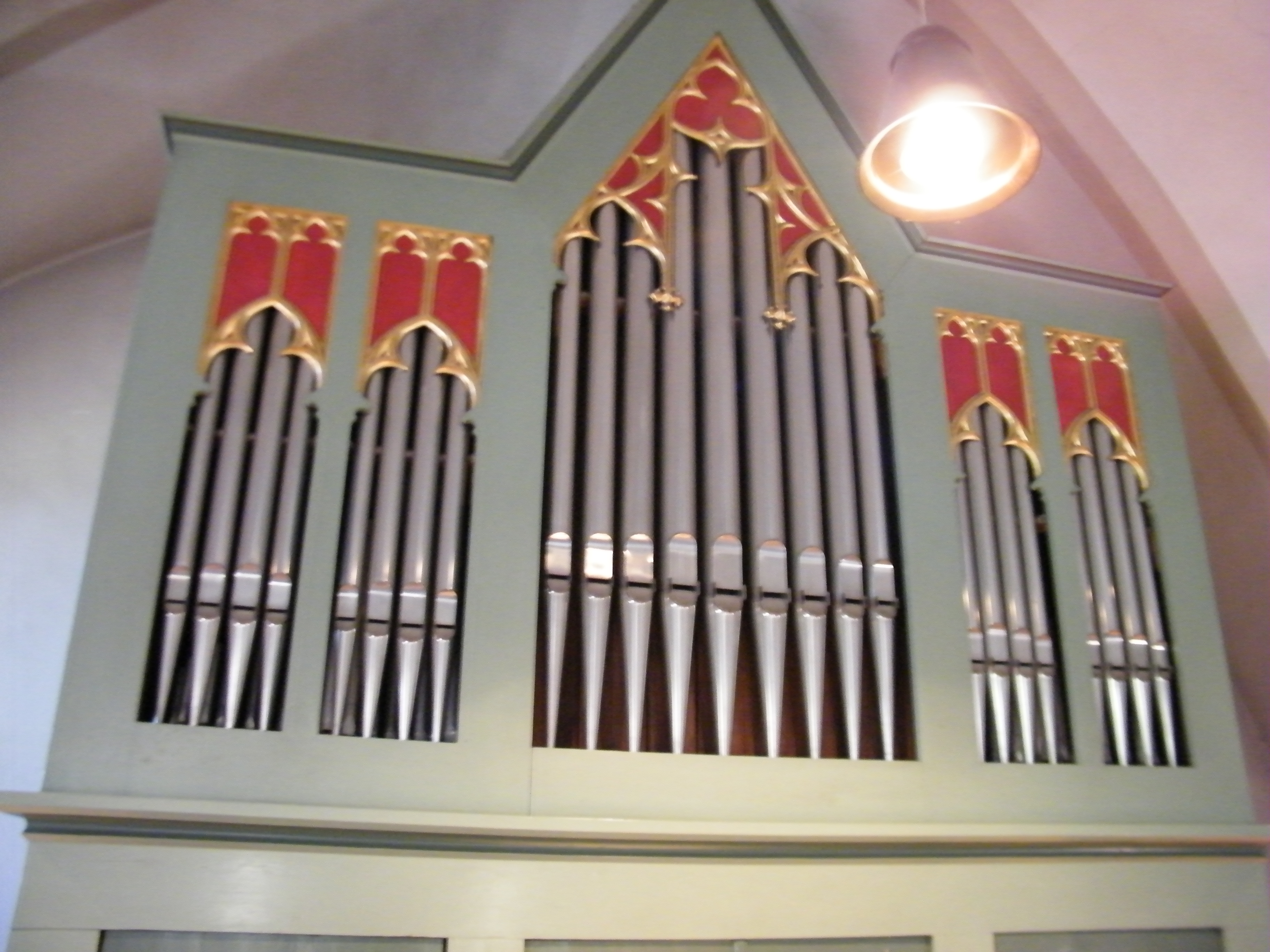 Opus 23 von Albert Mauracher 1891